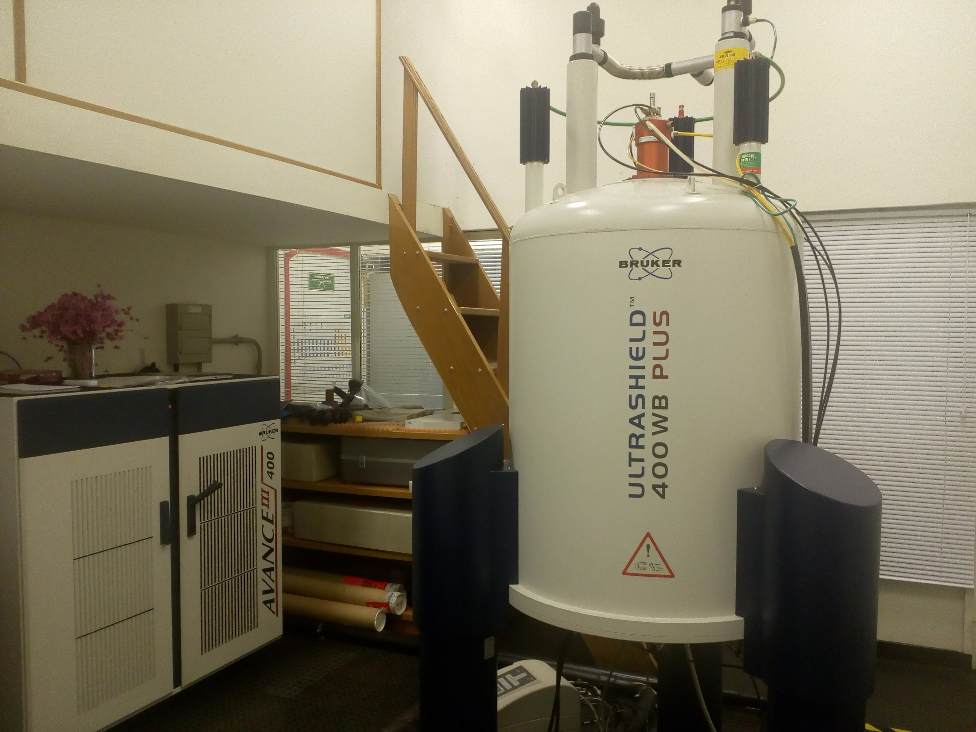 Instrumento do laboratório de RMN de sólidos do instituto de química da UFRJ